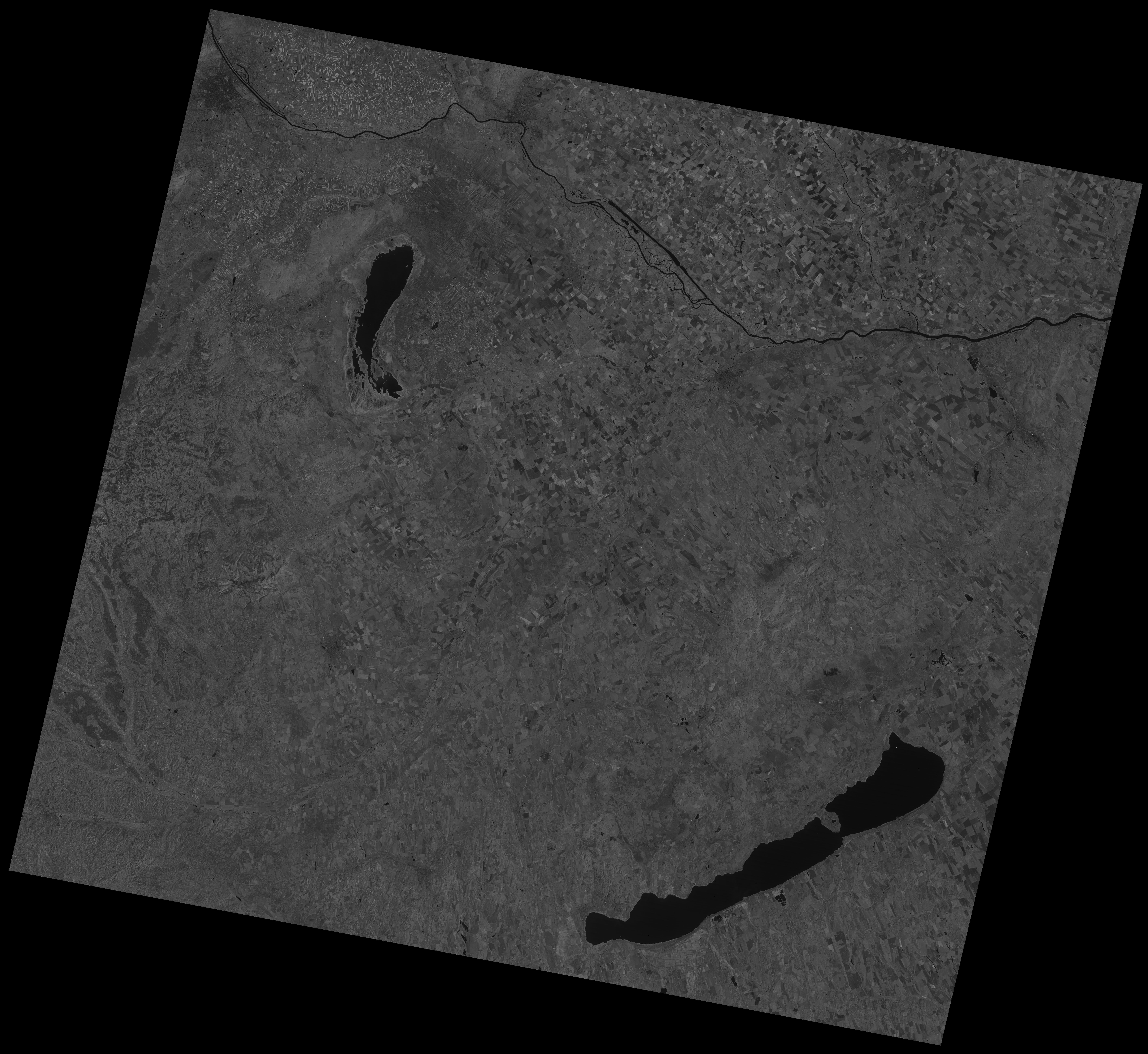 A Landsat-5 felvétele az Észak-Dunántúlról a közeli infravörös (4-es) sávban